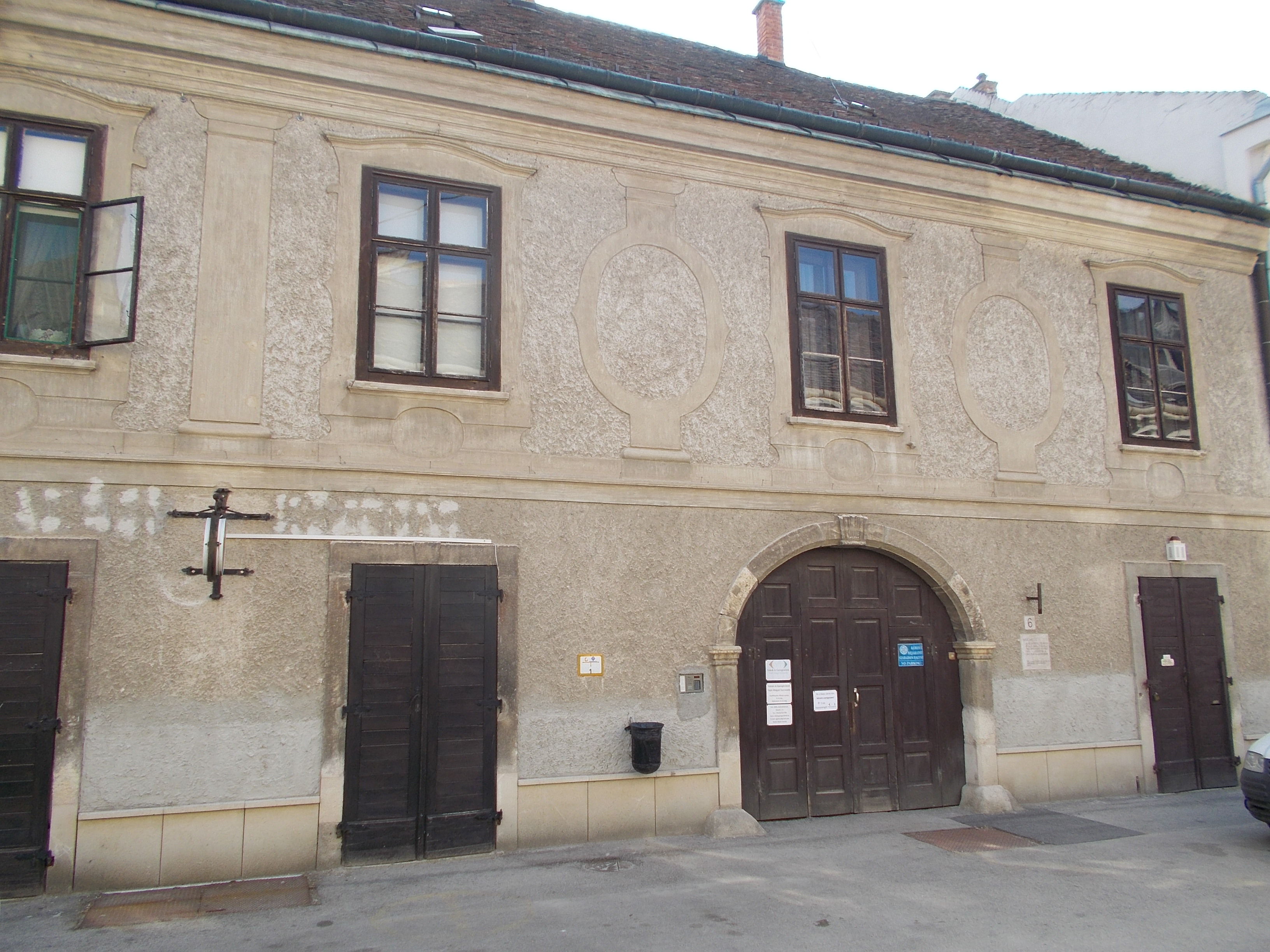 Műemlék lakóház ID 3877. Két középkori épület összeépítéséval alakult ki. Magja 14-15. századi átépítéssel. Jelenlegi alakjában barokk, 18. század. Goldzieher Ignác szülőháza. - Magyarország, Fejér megye, Székesfehérvár, Belváros, Oskola utca 6. This is a photo of a monument in Hungary, Identifier: 3877